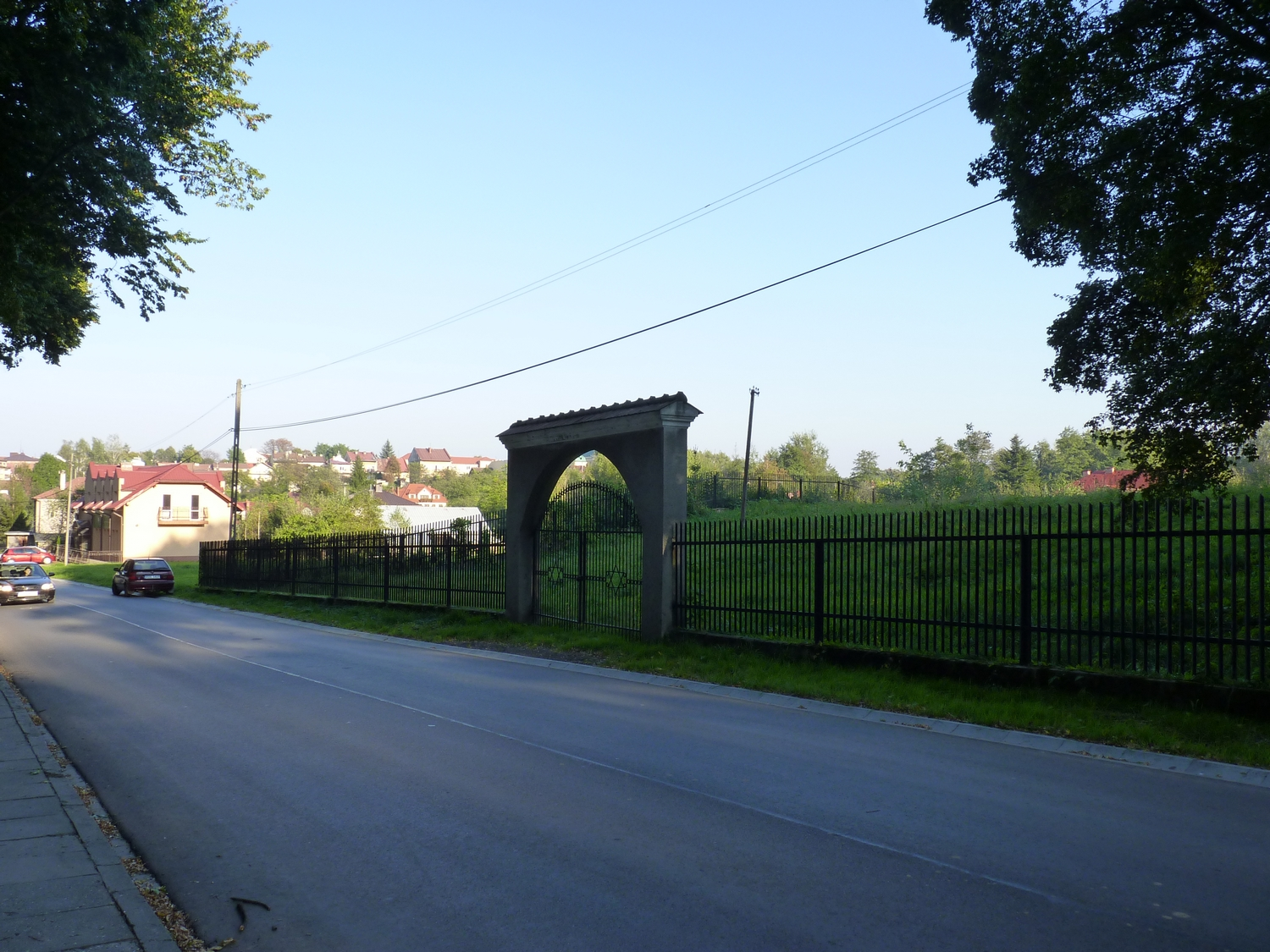 Cmentarz żydowski w Tyczynie